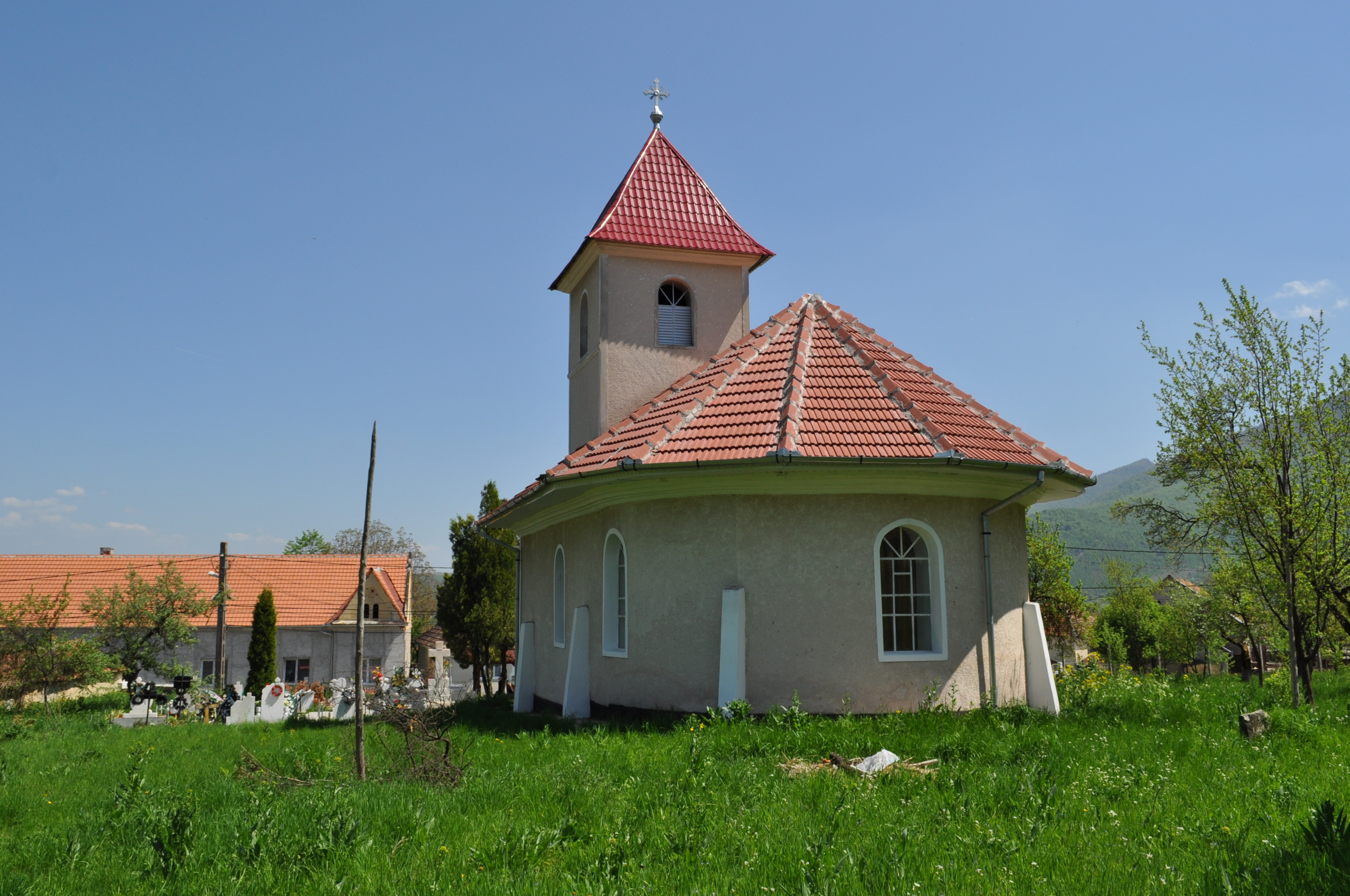 Biserica (fostă reformată) "Cuvioasa Paraschiva" , sat CLOPOTIVA; comuna RÂU DE MORI